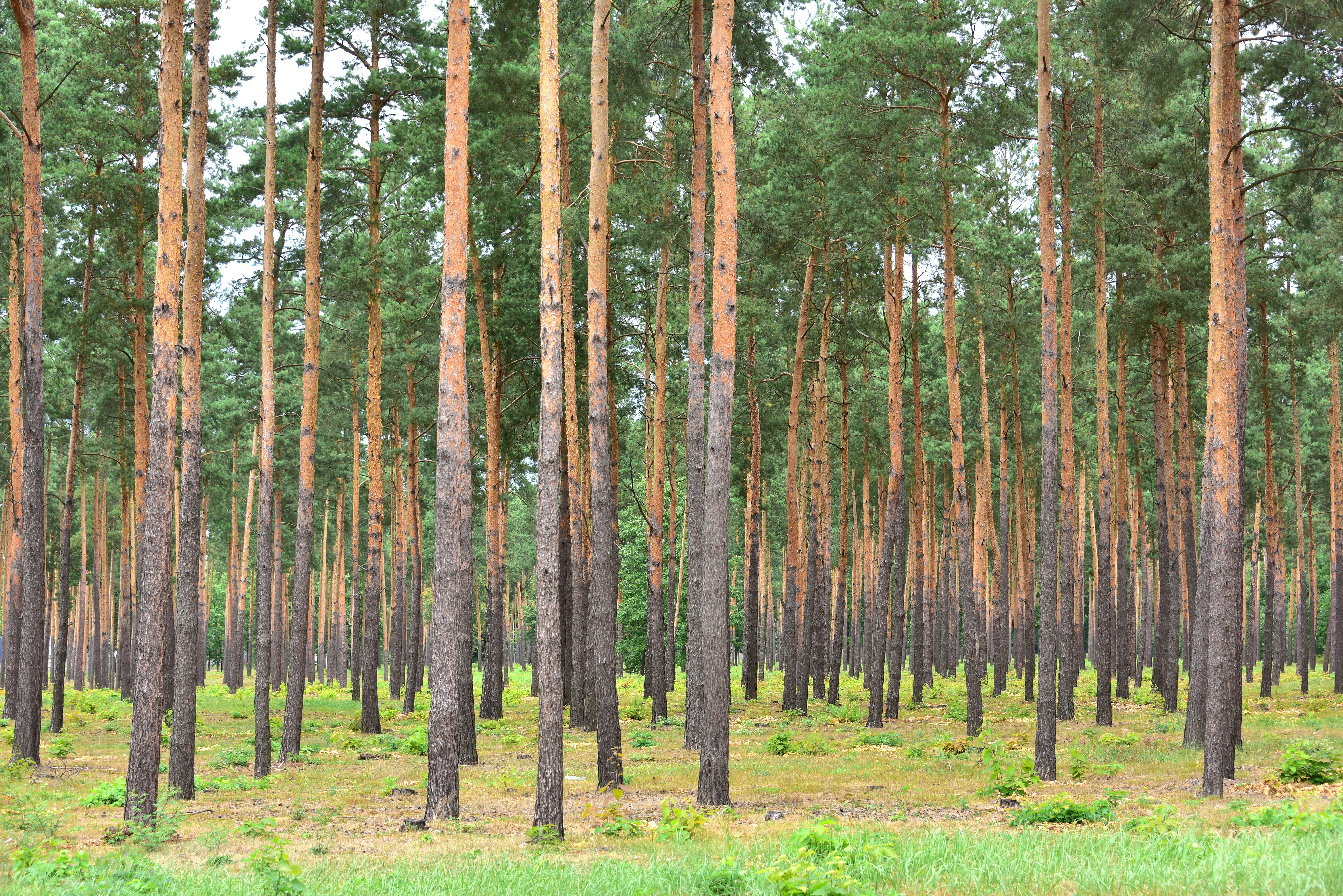 Bór sosnowy z usuniętym podszyciem przy ul. Trakt Brzeski w Sulejówku